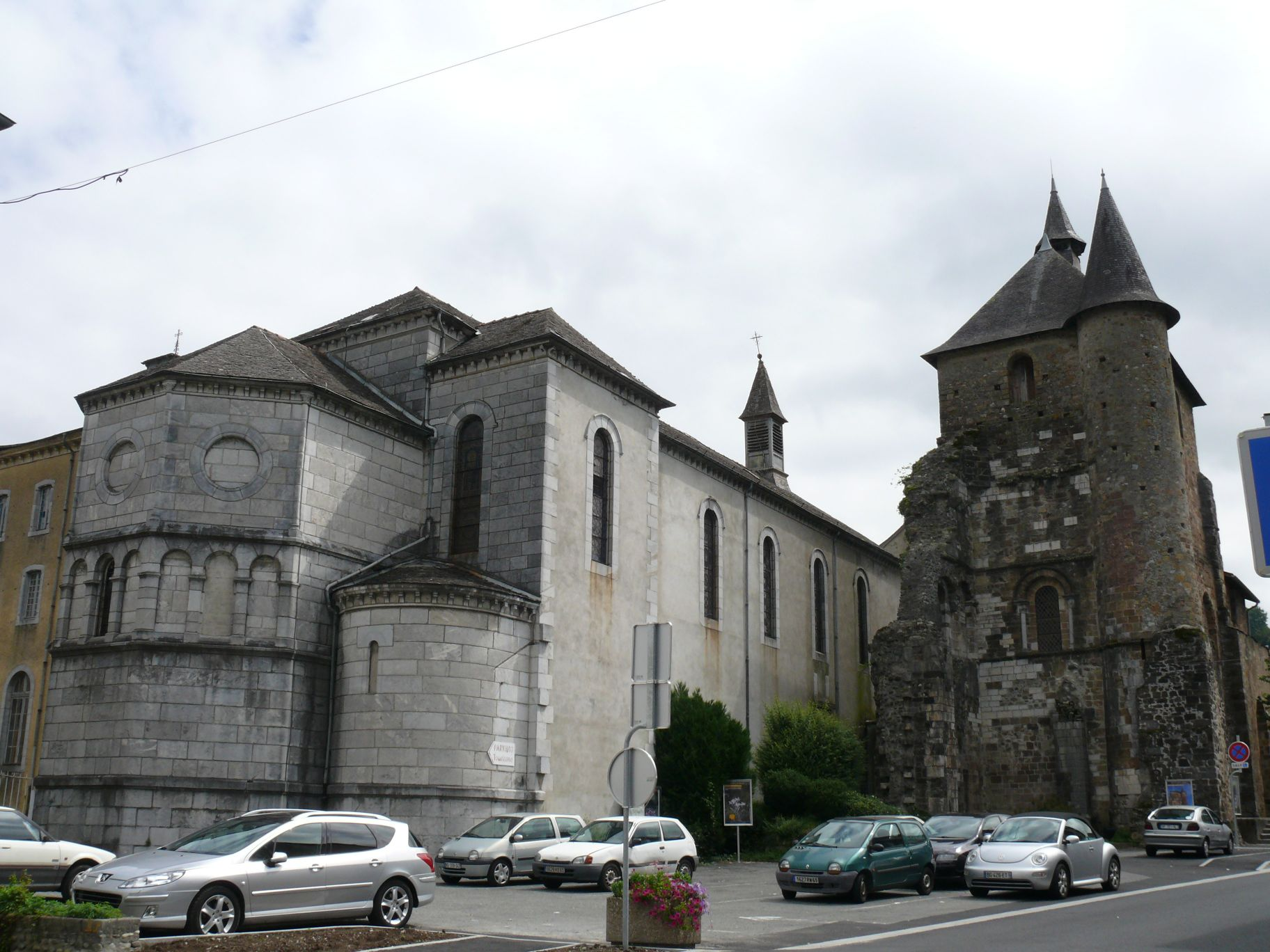 L'église Saint-Pierre, à droite, et la chapelle du petit séminaire, à gauche, de Saint-Pé-de-Bigorre (Hautes-Pyrénées, Midi-Pyrénées, France).